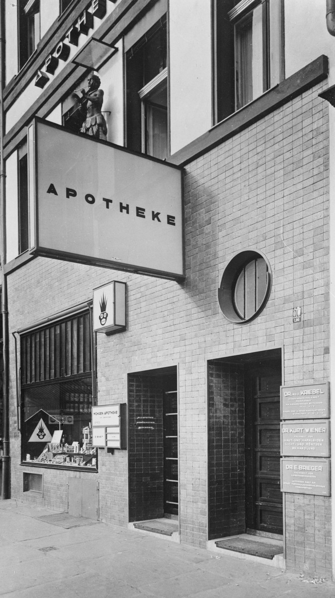 Mohren-Apotheke, Adolf Rading, Wrocław — Foto Marburg, Foto: unbekannt; Aufnahme-Nr. 1.164.878;; (9x12); Aufn.-Datum: um 1920/1939?